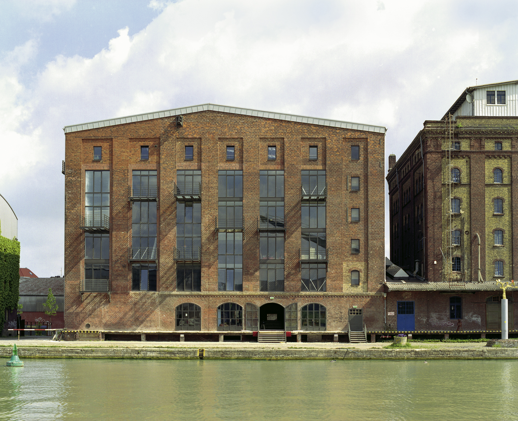 Die Ausstellungshalle zeitgenössische Kunst Münster vom Kanal aus gesehen